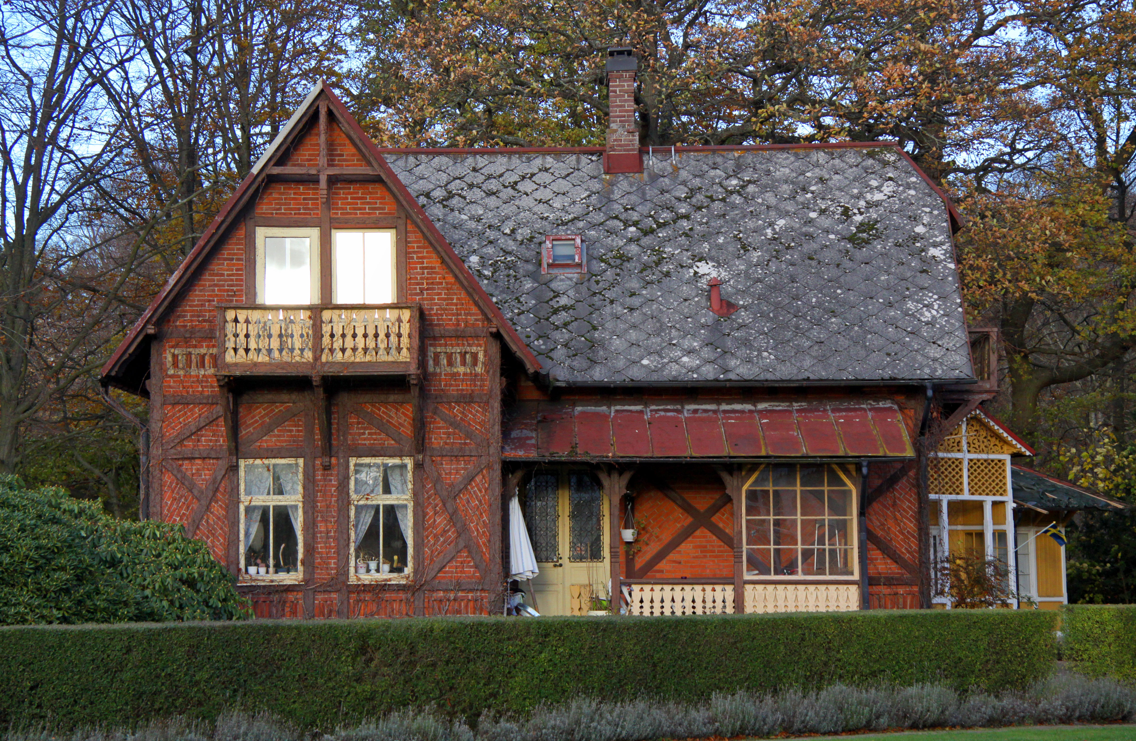 Helsingborg. I Ramlösa Brunnspark.